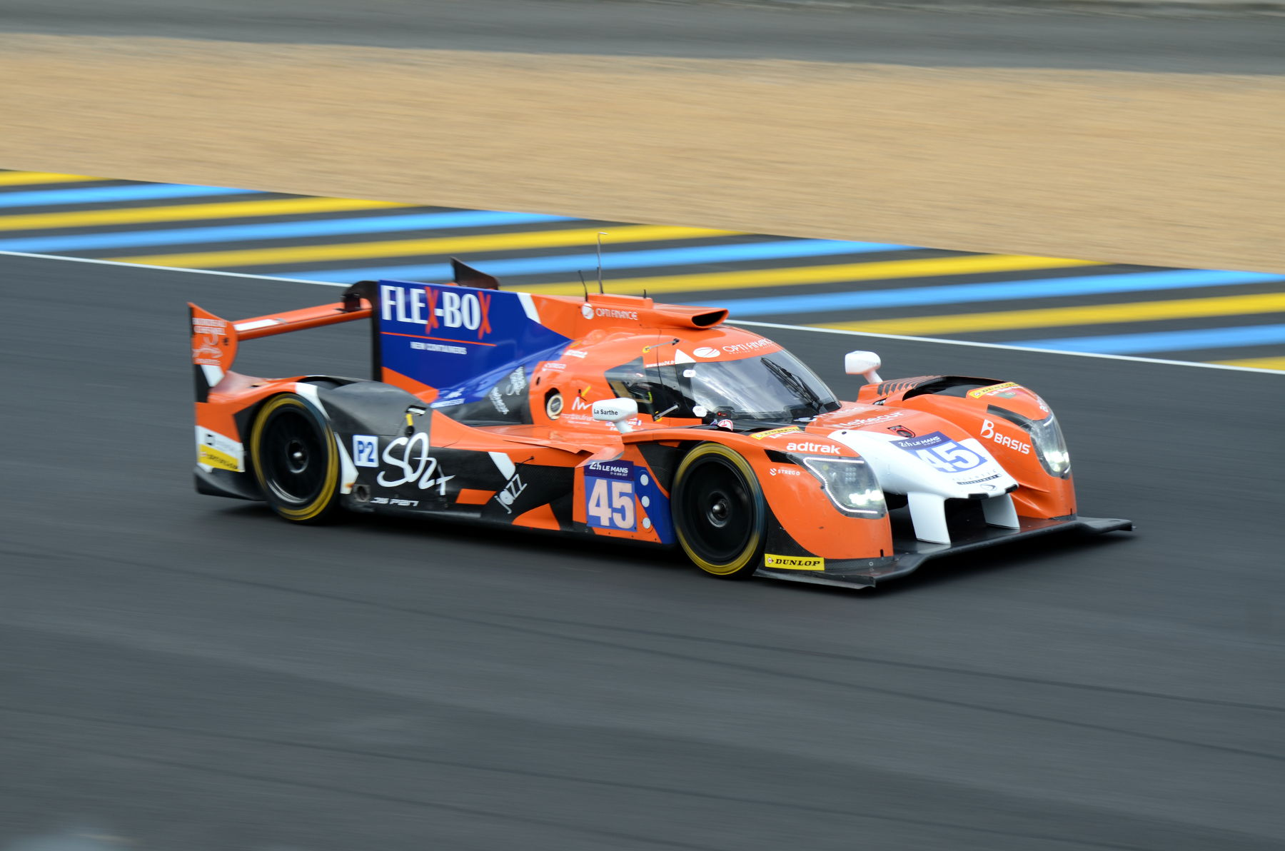 La Ligier JSP217 de l'écurie Algarve Pro Racing pilotée par Mark Patterson, Matthew McMurry et Vincent Capillaire aux 24 Heures du Mans 2017